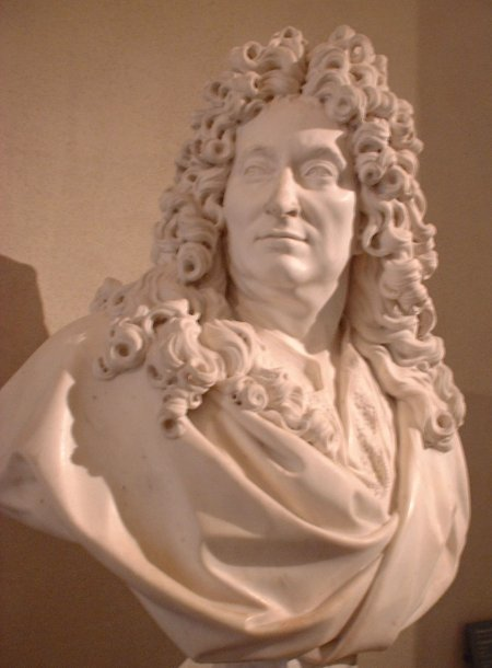 Description : buste de Nicolas Boileau par François Girardon, marbre Lieu : musée du Louvre (MR 2181) Source : photo personnelle